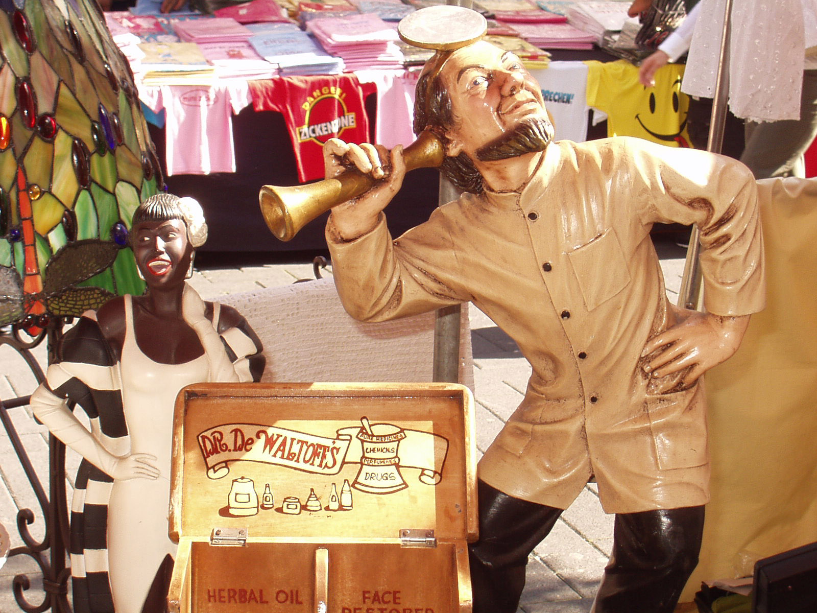 38. Zöppkesmarkt, (Trödelmarkt) in Solingen, Untere Hauptstr., Standdetail